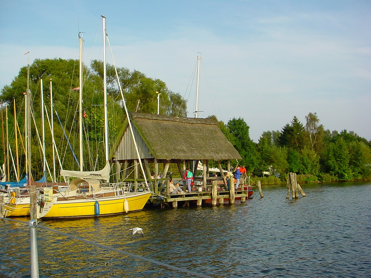 Bootsanlegestelle Römnitzer Mühle im Ratzeburger See in Schleswig-Holstein.